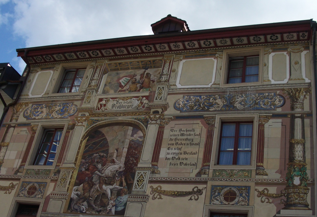 Der Rathskeller in Olten (Schweiz), rückseitige (grabenseitige) Fassade. Das Gebäude stammt von 1673 und steht am Rande der Altstadt, an Stelle der ehemaligen Ringmauer. Es war ursprünglich der Gaststall der Herberge "zum Löwen", im späteren 19. Jh. zu einem Wohnhaus umgebaut mit Versatzstücken der ehemaligen Fassade des "Löwen". Ein Restaurant ist das Gebäude seit 1896 (zunächst unter dem Namen "Baselbieter"), umgebaut und "historisierend" ausgestattet 1905-6, seit damals "Rathskeller". Das Gebäude heisst auch "Kübel" (dialektal Chöbu, Chübu).[1] Die Fresken auf der Fassade sind von Emil Kniep (1906). Auf der vorderen Fassade "Auszug der Oltner in den Bauernkrieg 1653" (s. File:Olten03.jpg), rückseitig "Der letzte Frohburger" [2] Die Wandmalerei zeigt den Grafen Eberhard von Frohburg auf seinem Ross, wie er auf der Aarebrücke vom Blitz erschlagen wird. Inschrift: "Der Hochmuth seinen Meister fand / die Herrenburg vom Boden schwand / Es schuf zu ewigem Bestand / das Volk sein freies Vaterland".[3] Die Frohburger waren bis zu ihrem Erlöschen im späteren 14. Jh. die Herren von Olten. Ein "letzter Frohburger" Eberhard, der von Blitz erschlagen worden wäre ist legendär; der letzte Graf von Frohburg war Johann, gestorben 1366 (den Grafentitel erbte kurzfristig Hermann VI., Abt des Klosters St. Urban, der jedoch im Folgejahr ebenfalls verstarb).[4]